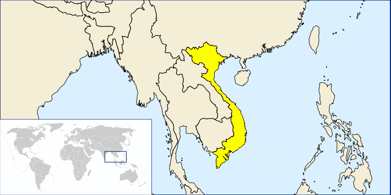 (en) Vietnam-Location (he) מיקום וויטנאם